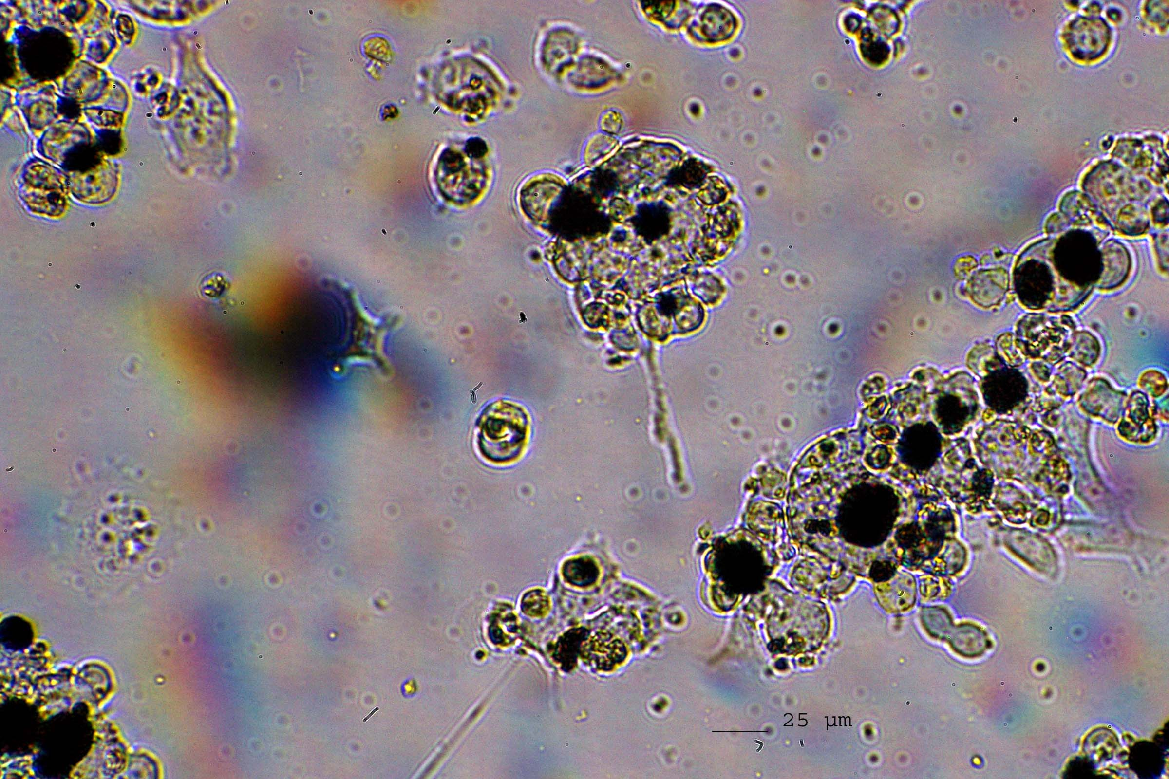 poudres d'hydroxyapatite cultivées en présence de cellules 4T1. Les poudres sont phagocytées par les cellules